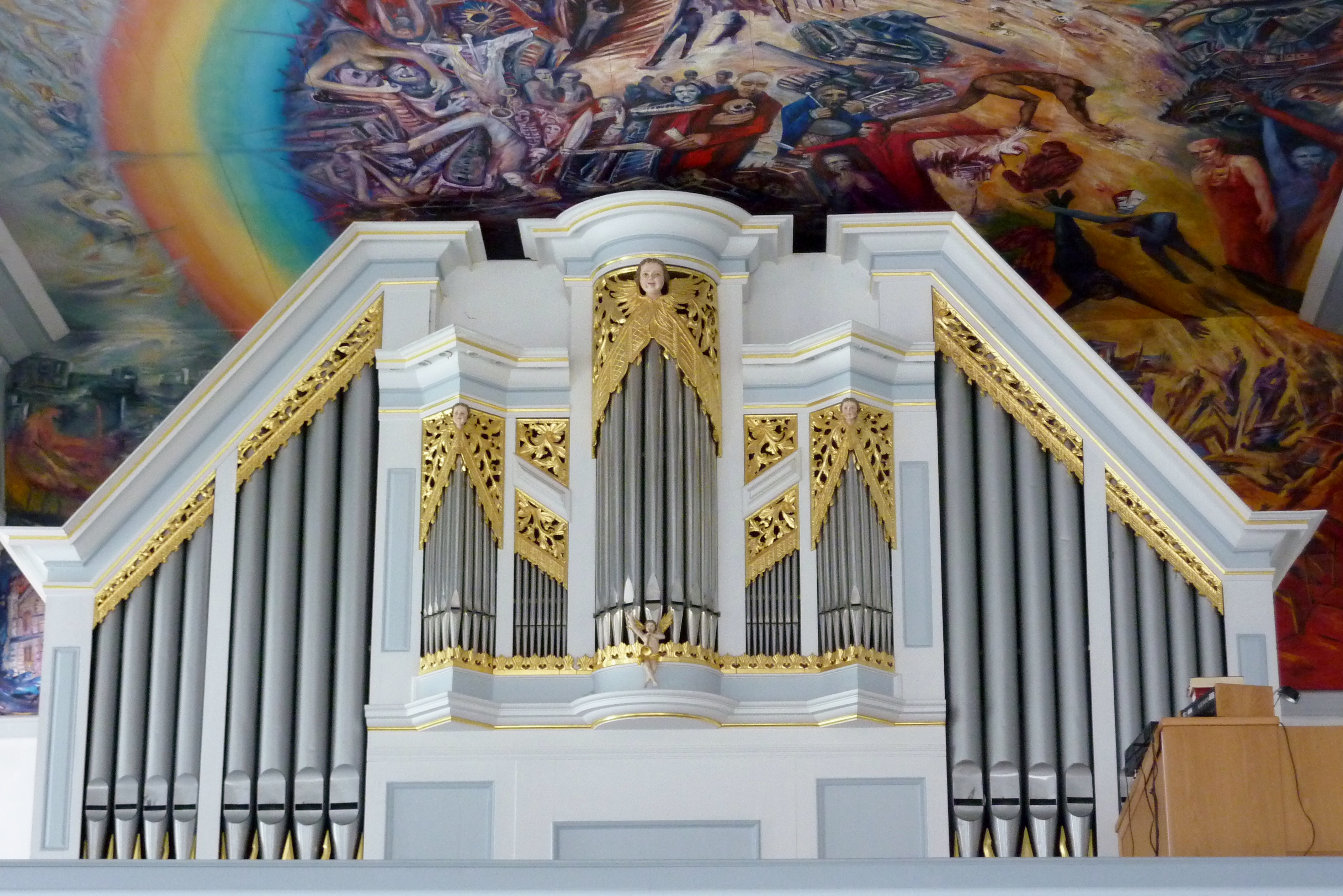 Evangelische Pfarrkirche von Reichensachsen, einem Ortsteil von Wehretal im Werra-Meißner-Kreis (Hessen), Orgel